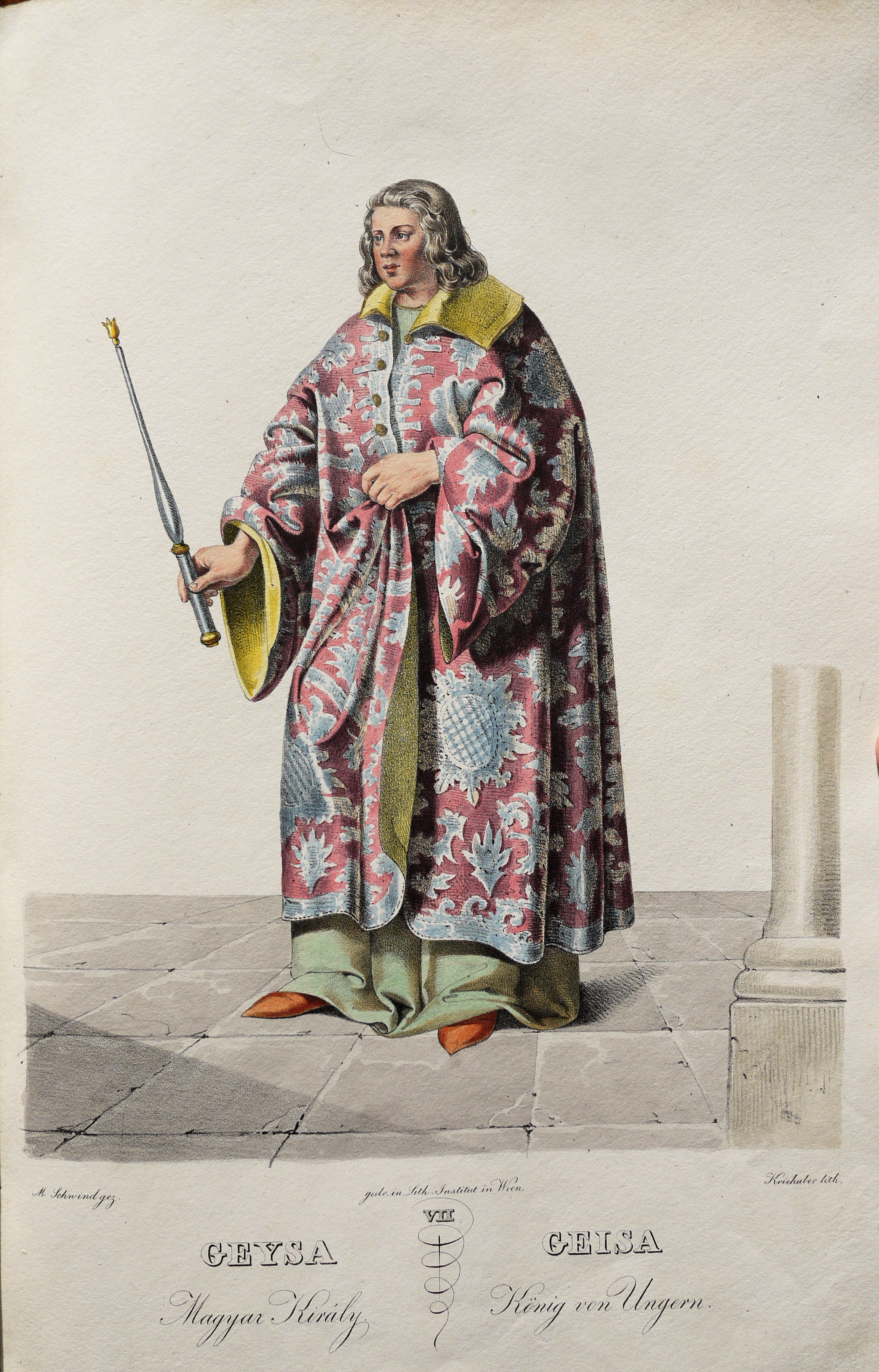 Géza I. (1048-1077), König von Ungarn. Lithographie von Josef Kriehuber nach einer Zeichnung von Moritz von Schwind aus Ungerns Erste Heerführer Herzoge und Koenige In einer Reihe von Bildnissen von Bela bis auf Seine Majestät Franz I. Kaiser Von Österreich König Von Ungern &c., &c. Wien : Lithographisches Institut ;ca. 1828